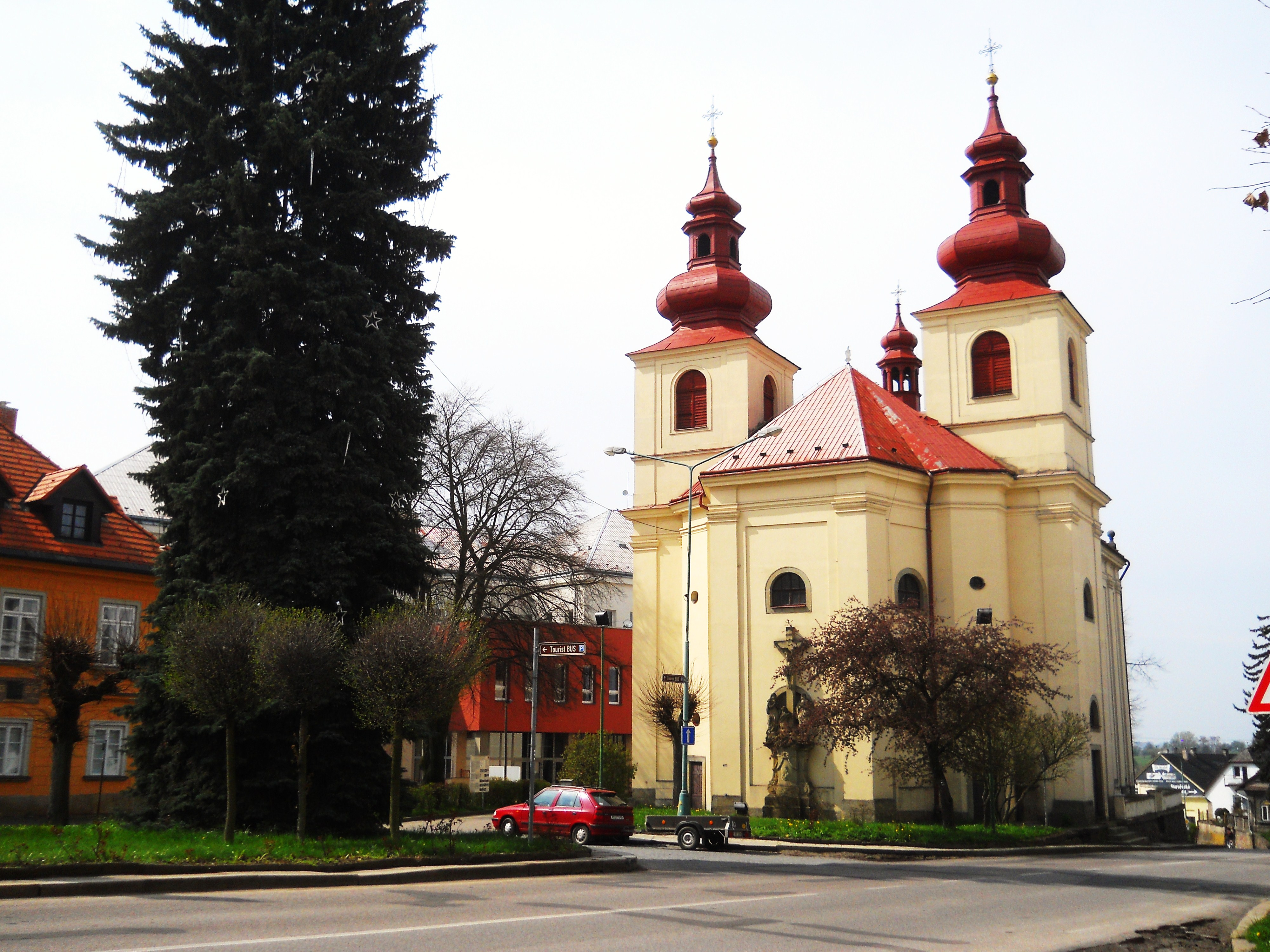 Kostel svatého Prokopa, Husovo náměstí, Vamberk.